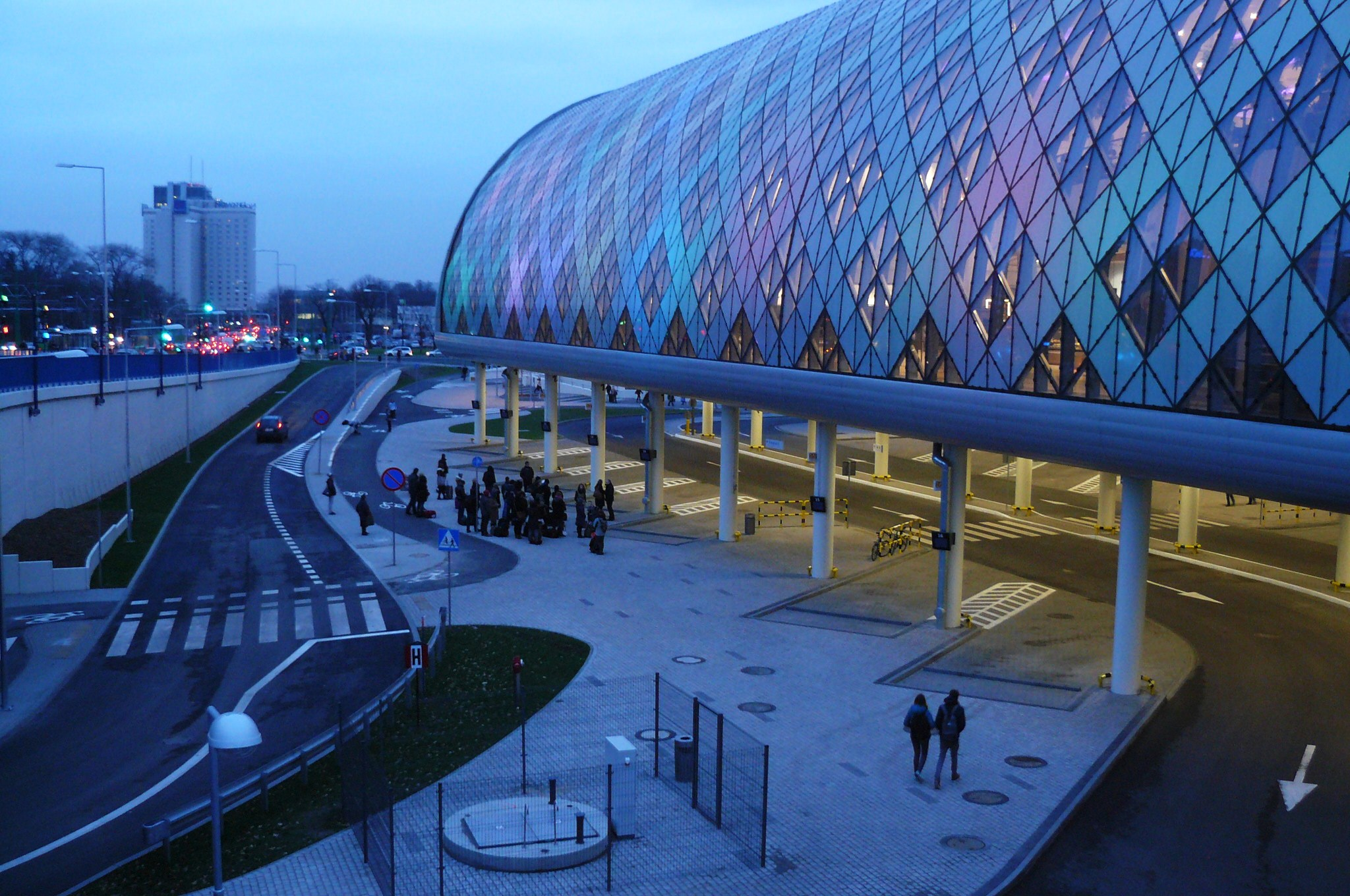 Poznań City Center, listopad 2013.